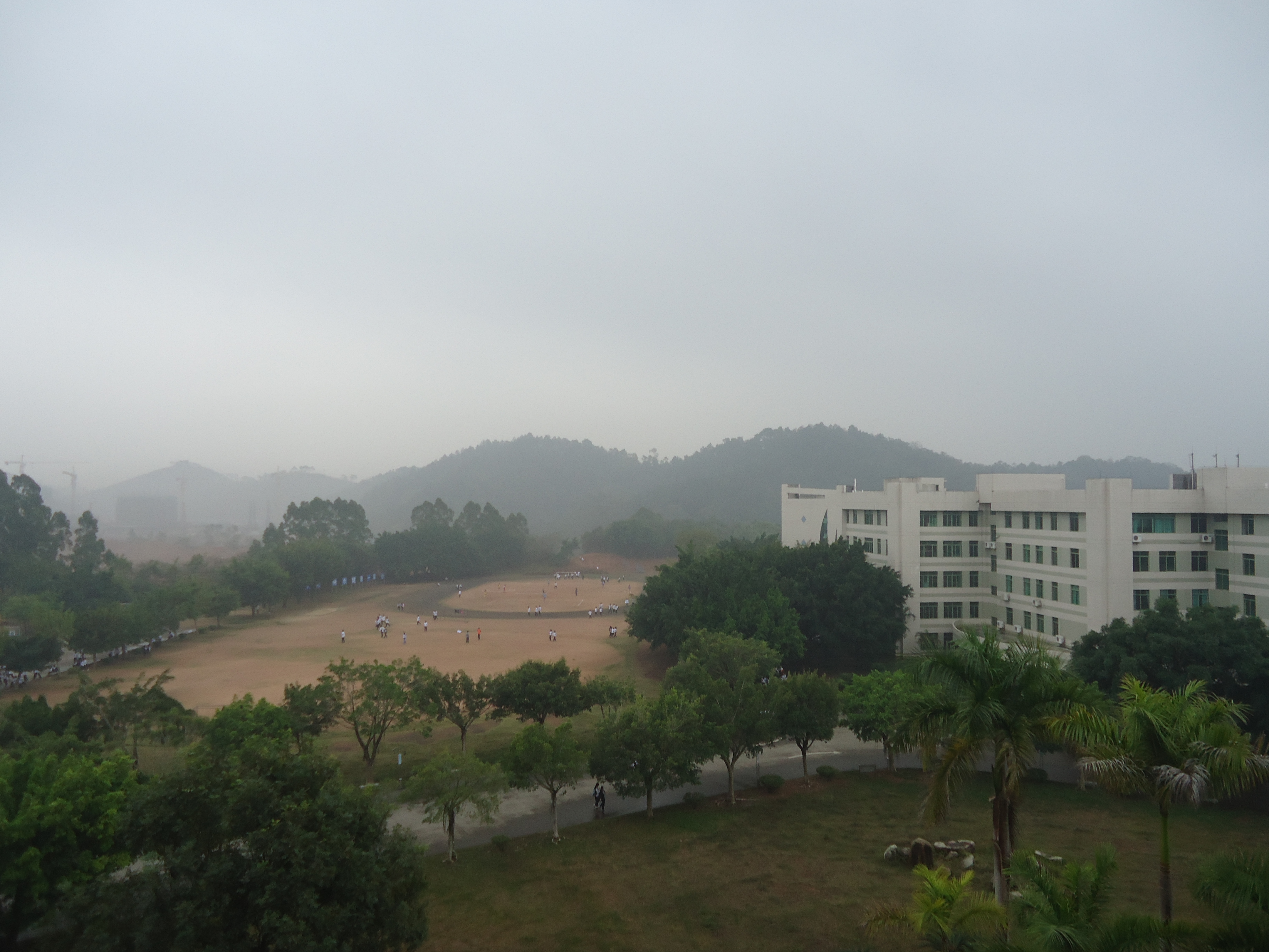 中文（中国大陆）: 信宜市教育城初级中学的景观，摄于教学楼②六楼。